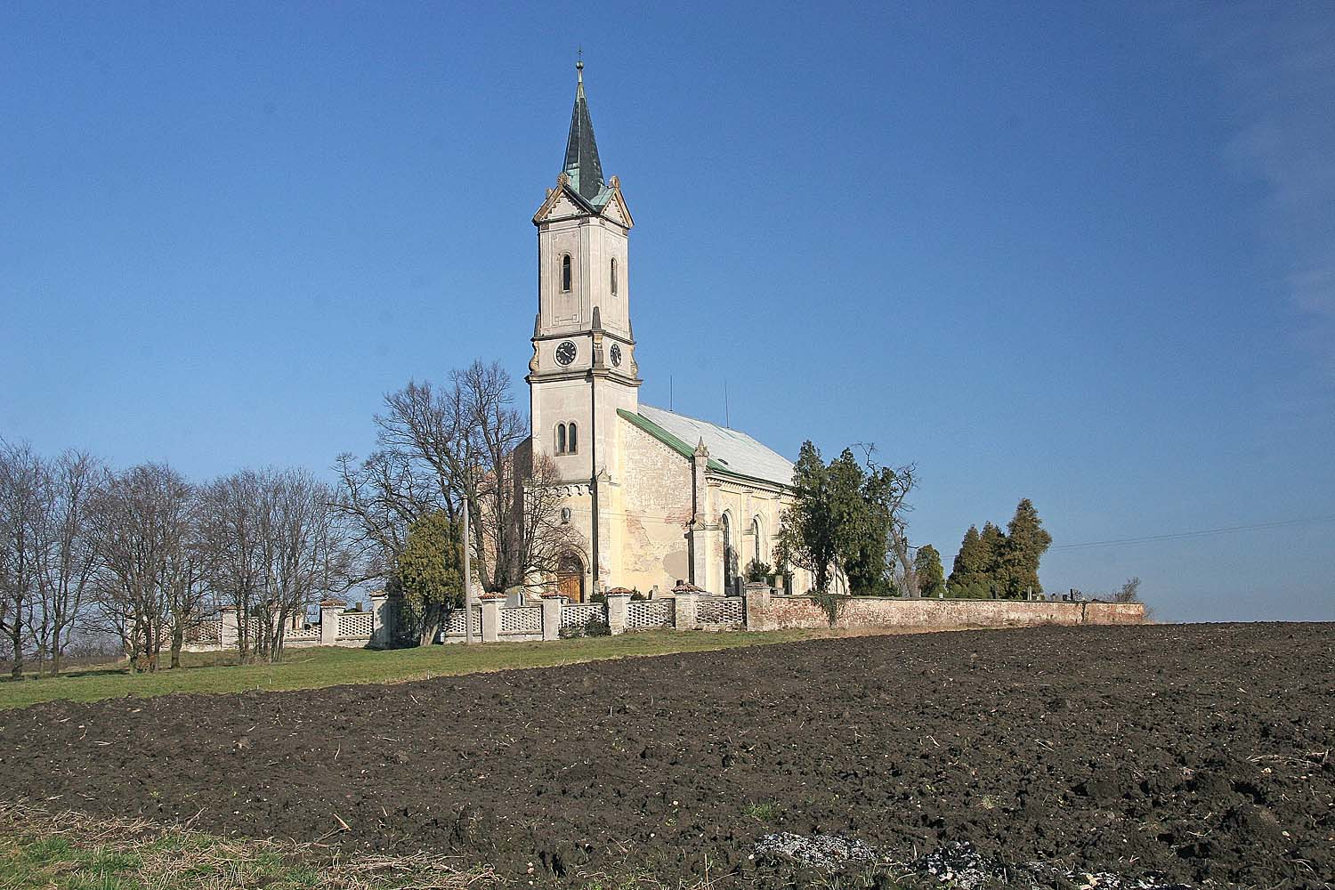 Chleby - evangelický kostel, district Nymburk autor:Prazak date: 17. 2. 2007